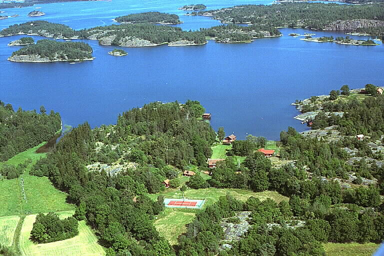 Barösund Motiv: Kättilö Nyckelord: Flygbilder, Riksintressen Kategori: Kust- och skärgårdsmiljöBarösund.